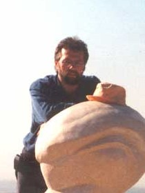 Израильский скульптор и ландшафтный дизайнер Руслан Сергеев